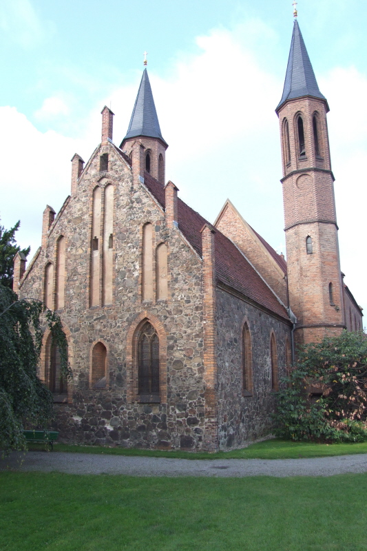 Dorfkirche in Berlin-Pankow (Altbauteil) Fotograf: Harald Rossa Datum: August 2006 Höher aufgelöste Version ist verfügbar